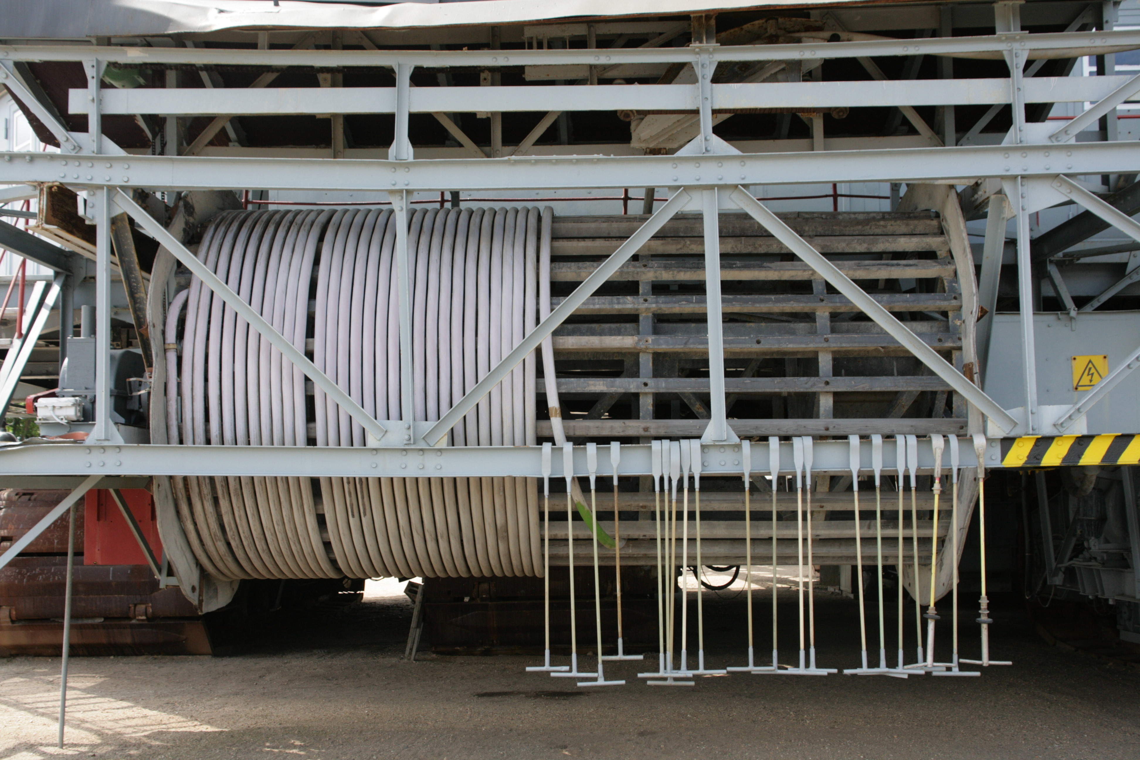 Schaufelradbagger 1452 im Museum “Bagger 1452”, Berzdorfer Straße 102 in Görlitz